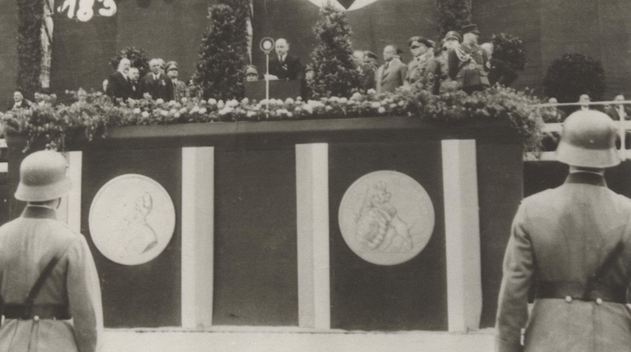 Tag der Bayerischen Tapferkeitsmedaille 1935, Präsident Hans Zöberlein spricht.